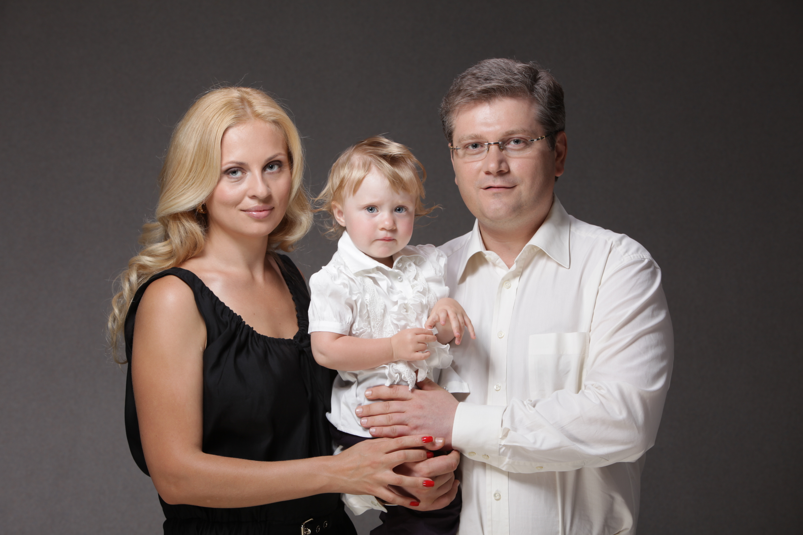 Александр Вилкул с женой Еленой и дочерью Мариной